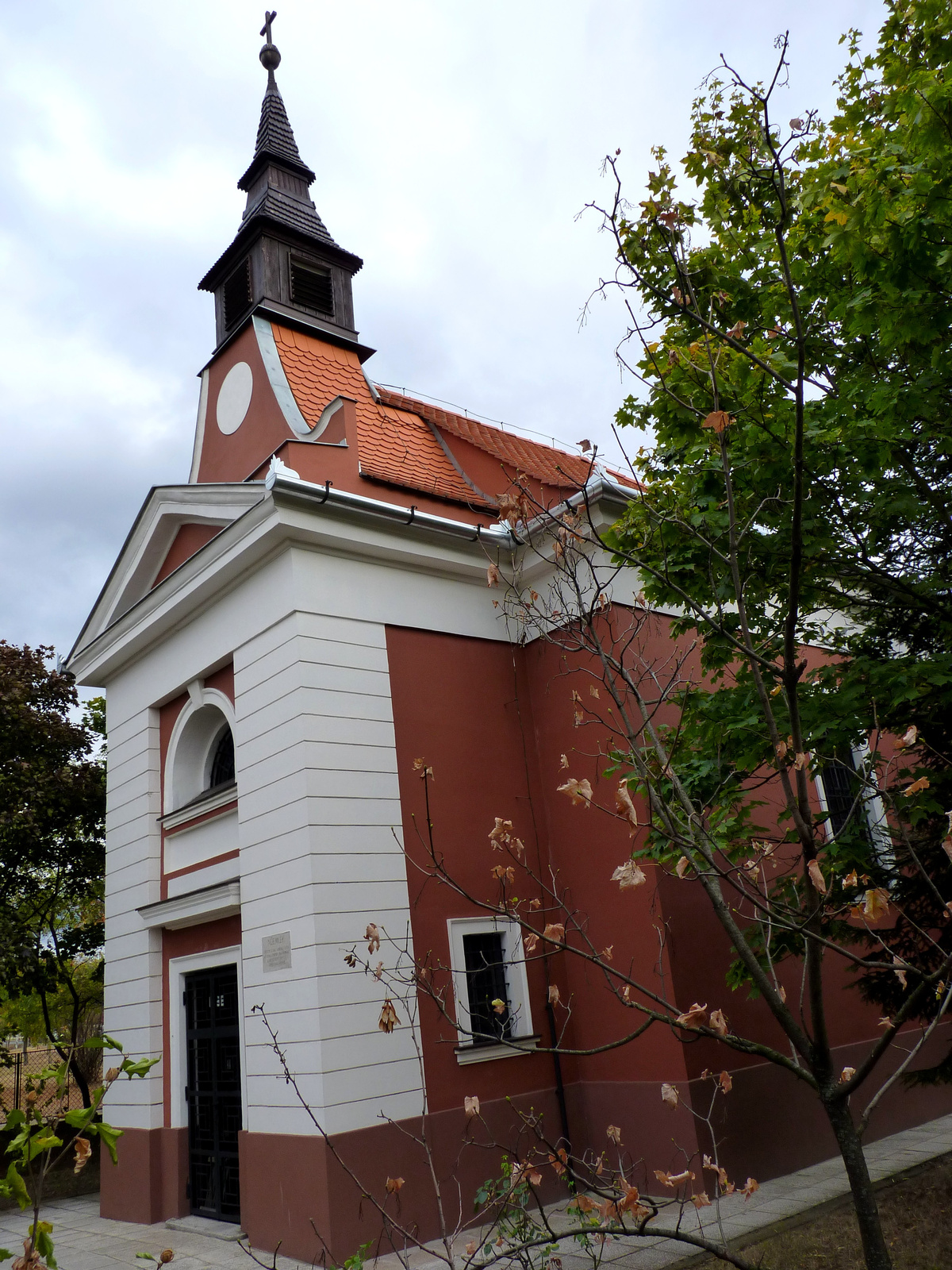 R.k. kápolna (Budapest 18, Margó Tivadar utca végén, volt Szemere major), Grassalkovich-kápolna